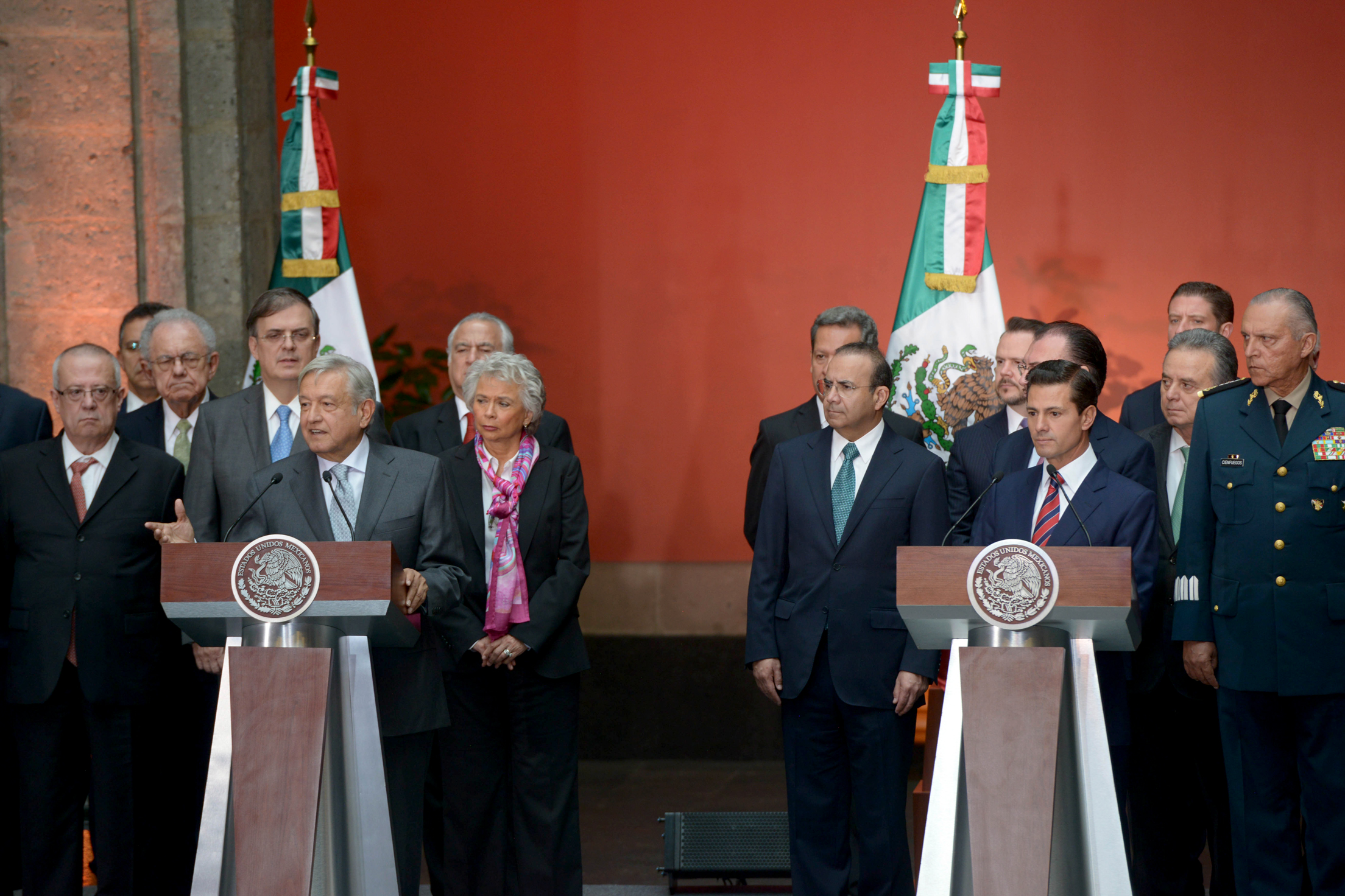 El Presidente Enrique Peña Nieto se reunió con el Presidente Electo, Andrés Manuel López Obrador, el gabinete actual y los titulares de la dependencias del próximo gobierno, para dar inicio formal al proceso de transición.